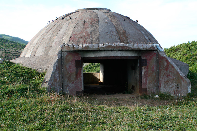 A bunker in Albania